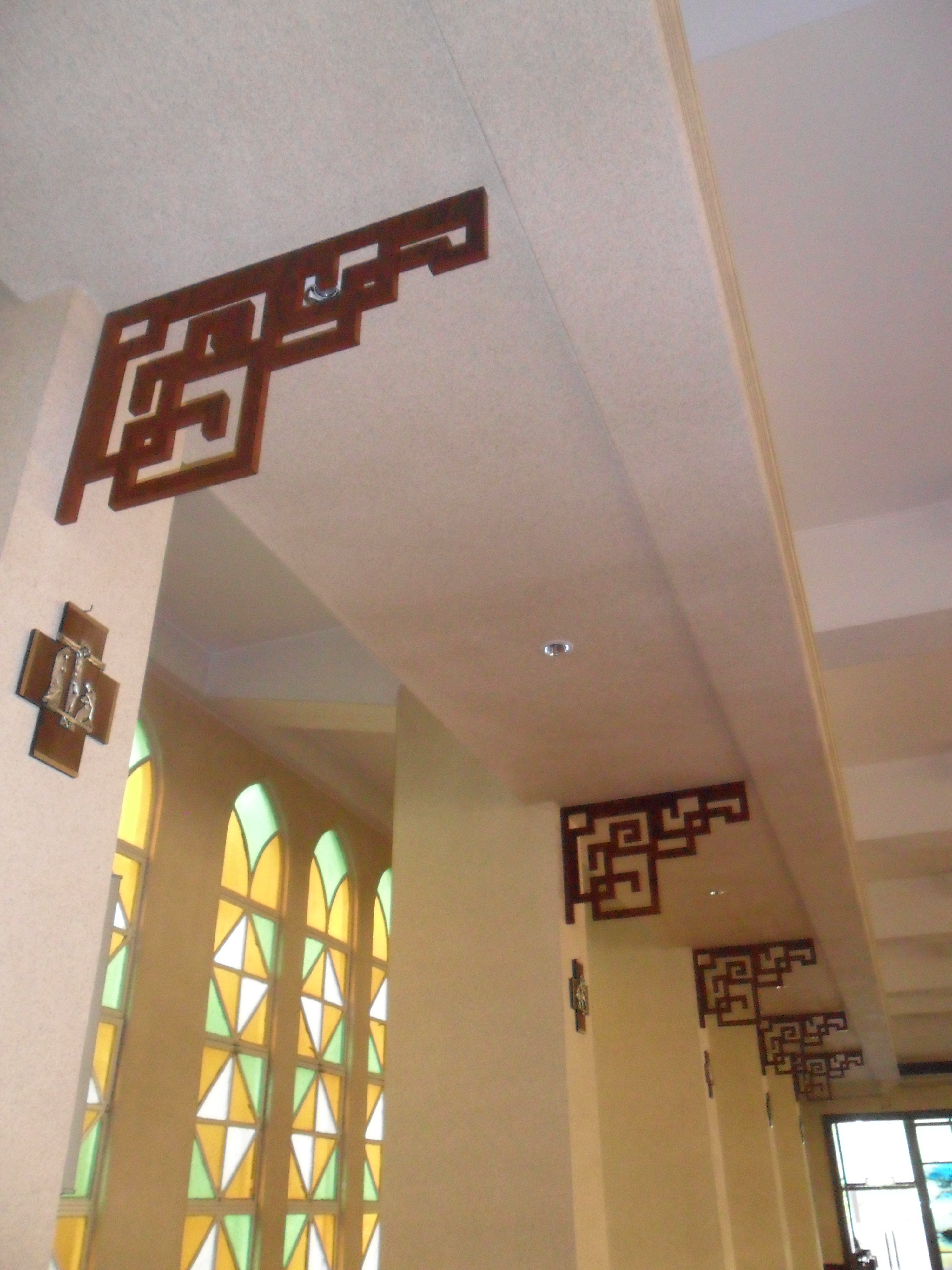 中文（香港）: 聖斯德望堂, 香港, 中國